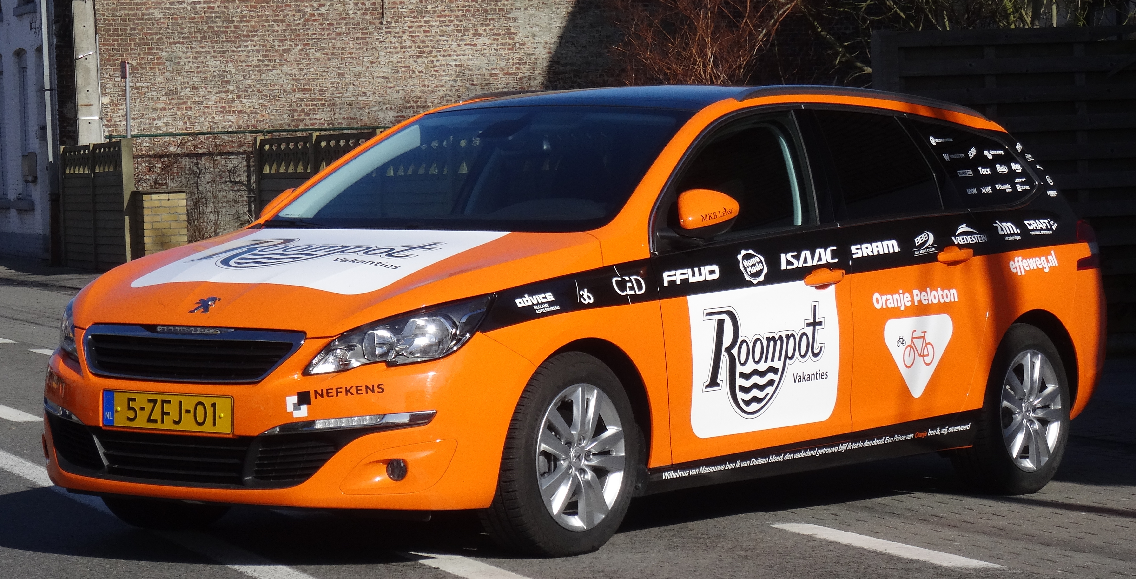 Reportage réalisé le dimanche 1er mars à l'occasion du départ et de l'arrivée de Kuurne-Bruxelles-Kuurne 2015 à Kuurne, Belgique.